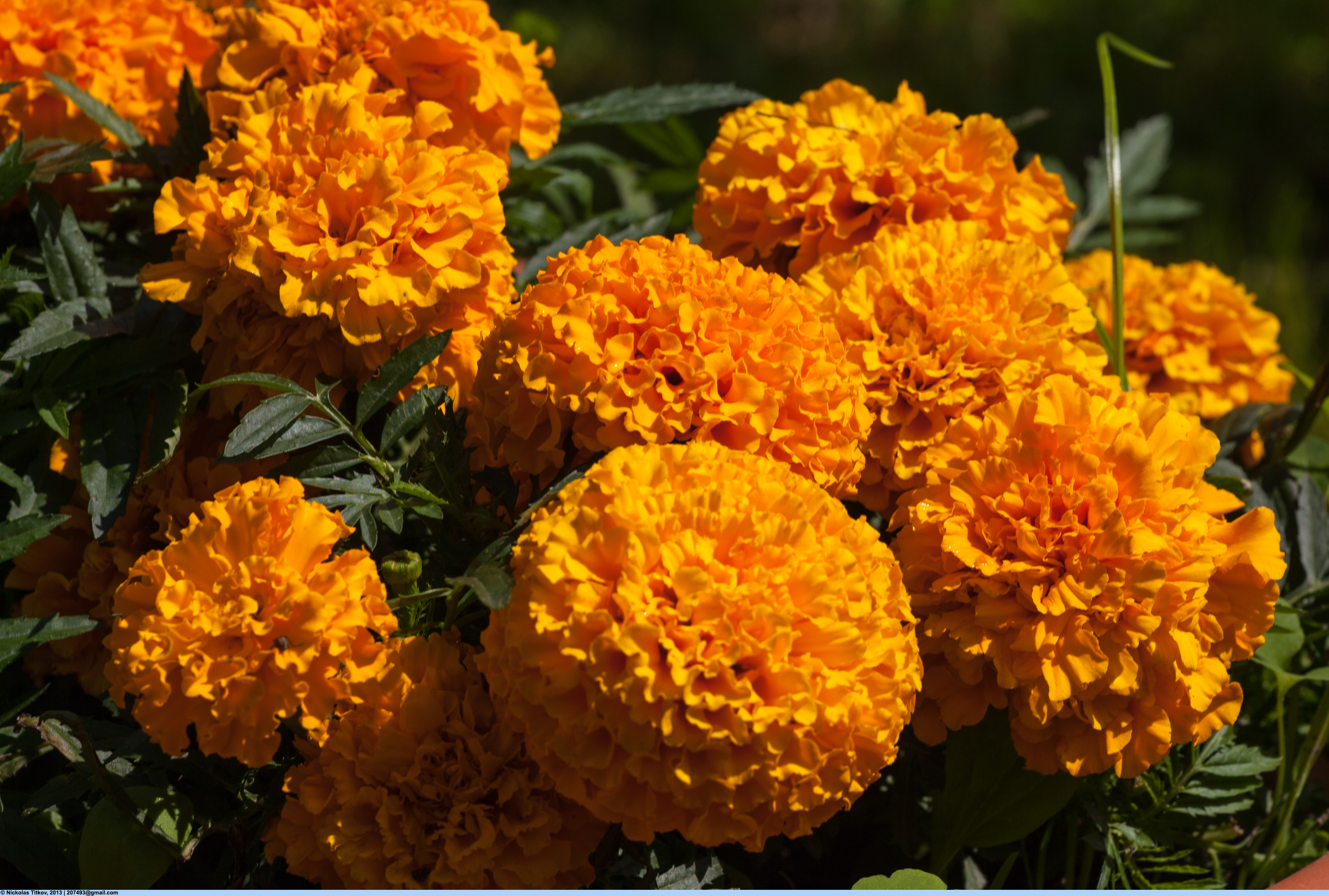 Бархатцы (лат. Tagetes) — род однолетних и многолетних растений семейства Астровые, или Сложноцветные. Латинское название произошло от имени внука бога Юпитера — Тагеса (Tages), славившегося своей красотой и умением предсказывать будущее. Происходят из Америки, где дико произрастают от Нью-Мексико и Аризоны до Аргентины.